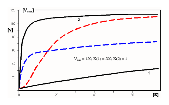 Zum Artikel selbst angefertigt Juergen Bode 09:16, 18. Dez 2004 (CET)